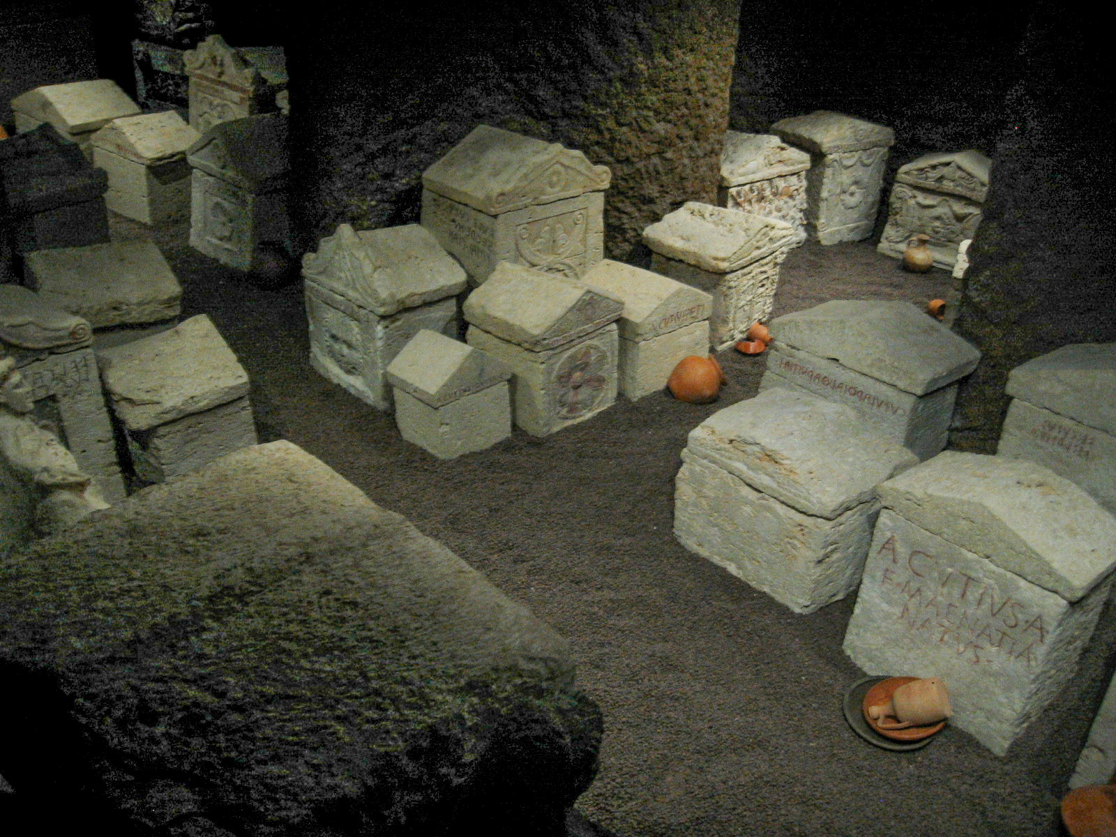 "Nel dicembre 1983 a Perugia fu scoperta una tomba etrusca inviolata. Un giardiniere, zappando l'orto, aveva provocato lo sfondamento di parte della volta del vestibolo". La ricostruzione accurata della tomba etrusca dei Cai Cutu (se ricordo correttamente il nome della famiglia). Le urne comunque sono vere.